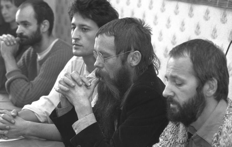 Halle, Pressekonferenz zur Enttarnung eines IM BER-24/24.9.90/Halle: Enttarnt/ Henry Schramm, Spitzenkandidat der Grünen Partei für die Landtagswahlen in Sachsen-Anhalt, bestätigte auf einer Pressekonferenz die in der "Neuen Presse" Halle aufgestellte Behauptung, dass er jahrelang für die Staatssicherheit gearbeitet habe. Abgebildete Personen: Schramm, Henry: 1990 Kandidat der Grünen für den Landtag Sachsen-Anhalt, DDR